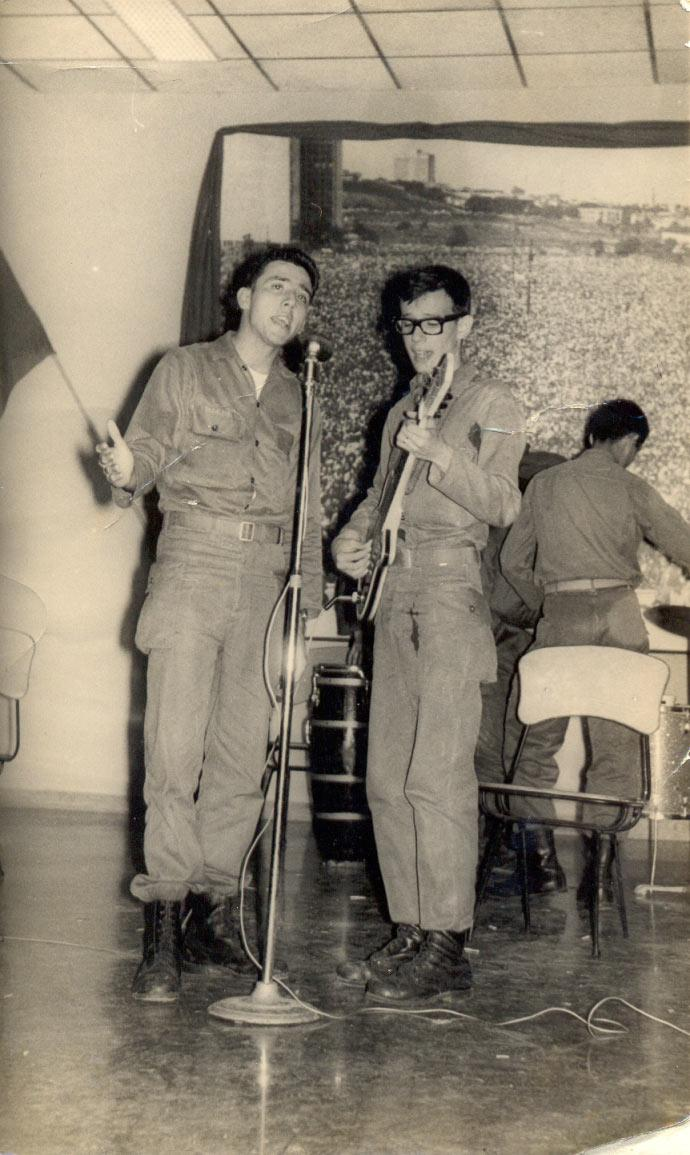 Silvio Rodríguez en 1965, mientras hacía el Servicio Militar. Fotografía tomada por Andrés Vallin, proporcionada con el permiso de Silvio Rodríguez, desde su sitio web personal